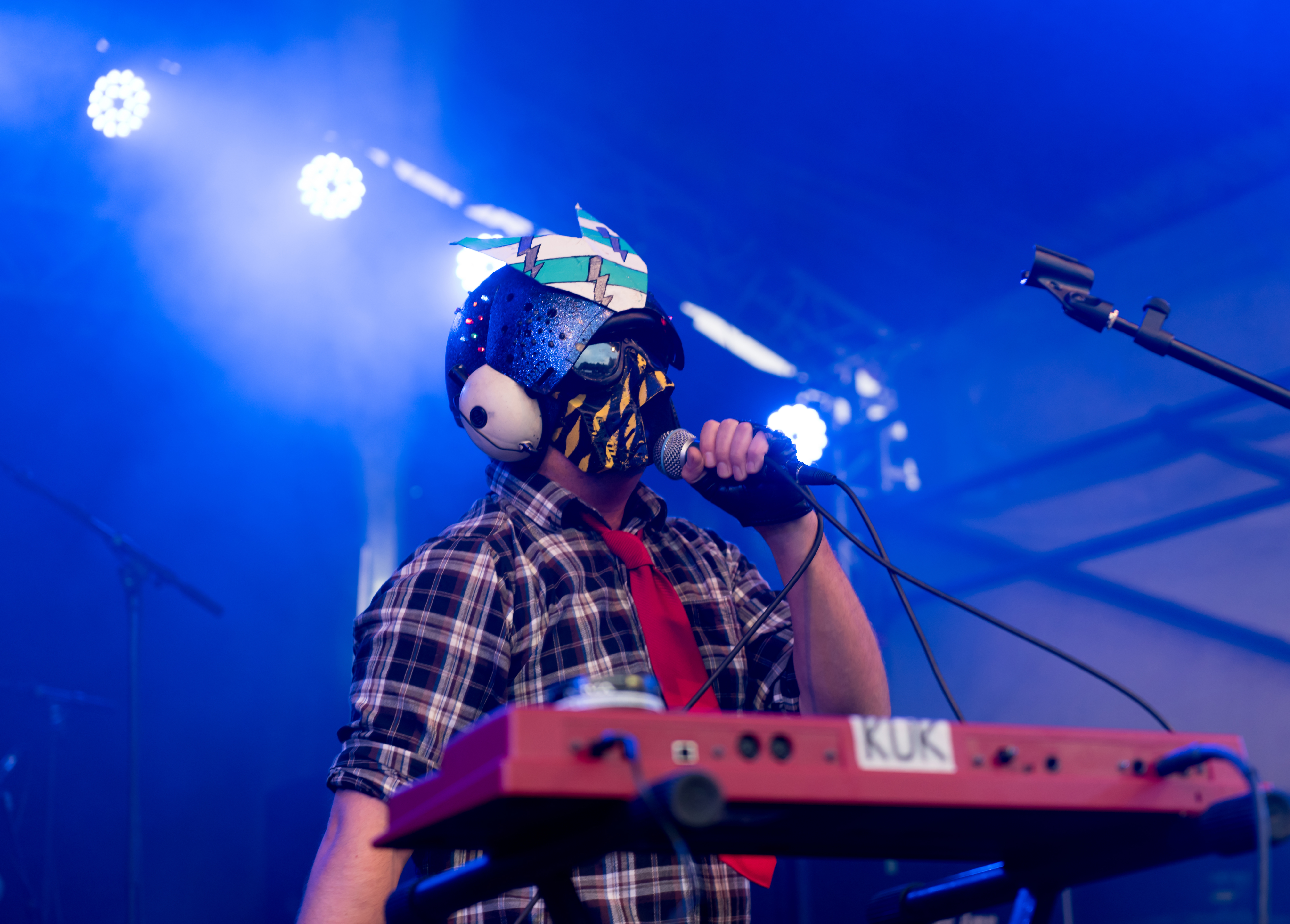 Bondage Fairies live beim Ackerfestival 2017